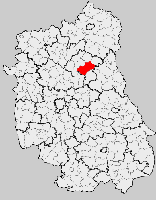 Map of gmina Dębowa Kłoda, Parczew county, Lublin voivodship Mapa gminy Dębowa Kłoda, powiat parczewski, województwo lubelskie